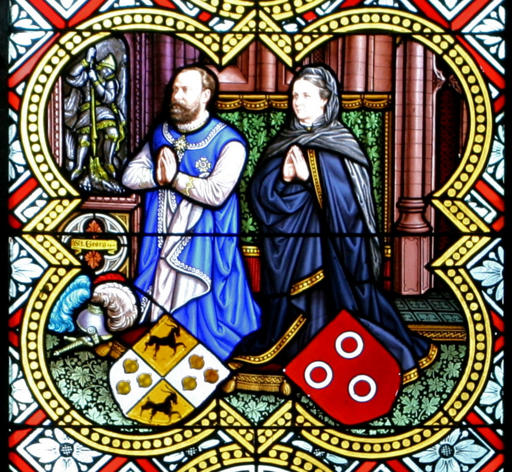 Bodman, St. Peter und Paul, Fenster von 1889 mit den Stiftern Franz von und zu Bodman und seiner Ehefrau Sophie Freiin von Landenberg mit ihren Wappen